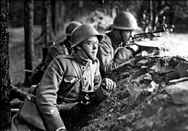 Prins Carl Johan Bernadotte på höstmanövern 1938.